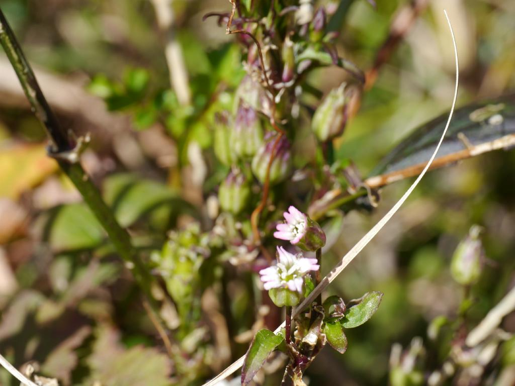 Silene firma：フシグロ 2016/11/13 生石山（和歌山県）：Mount Oisi(Wakayama Pref,)